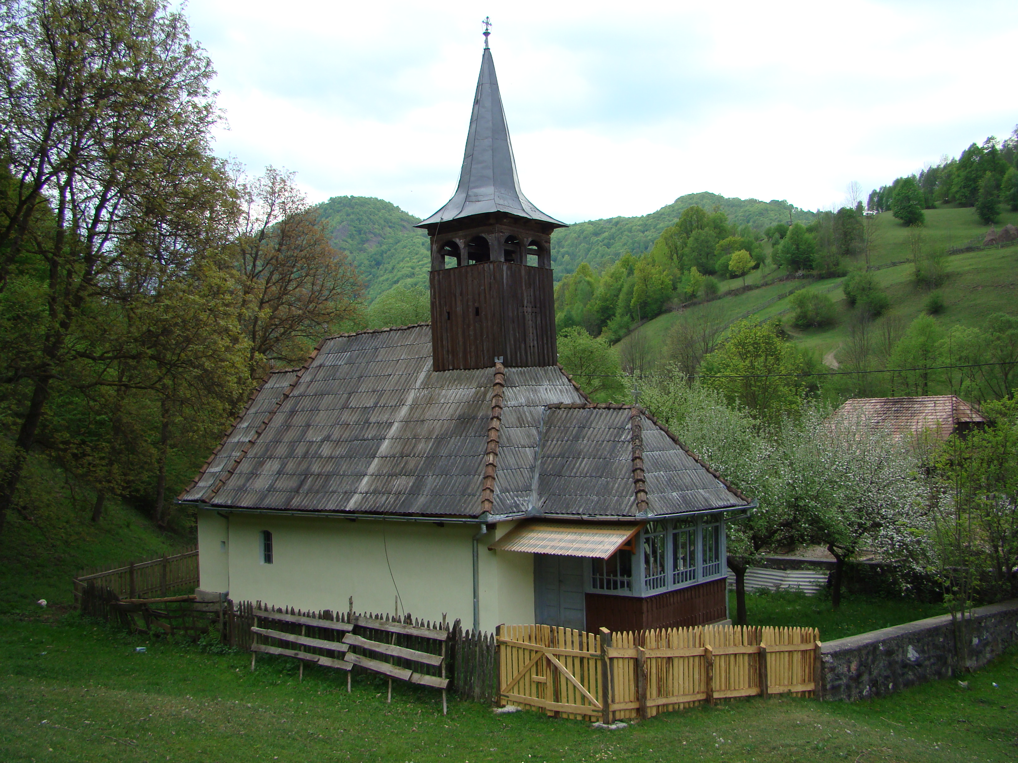 Biserica de lemn din Lunca Largă